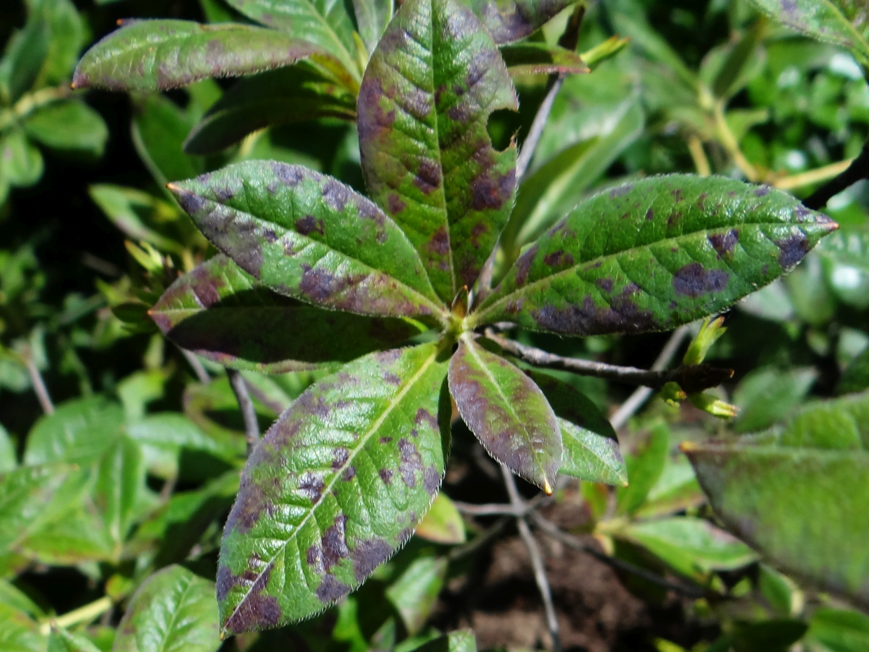 Sphaerulina azaleae (Septoria azaleae) on Rhododendron sp.